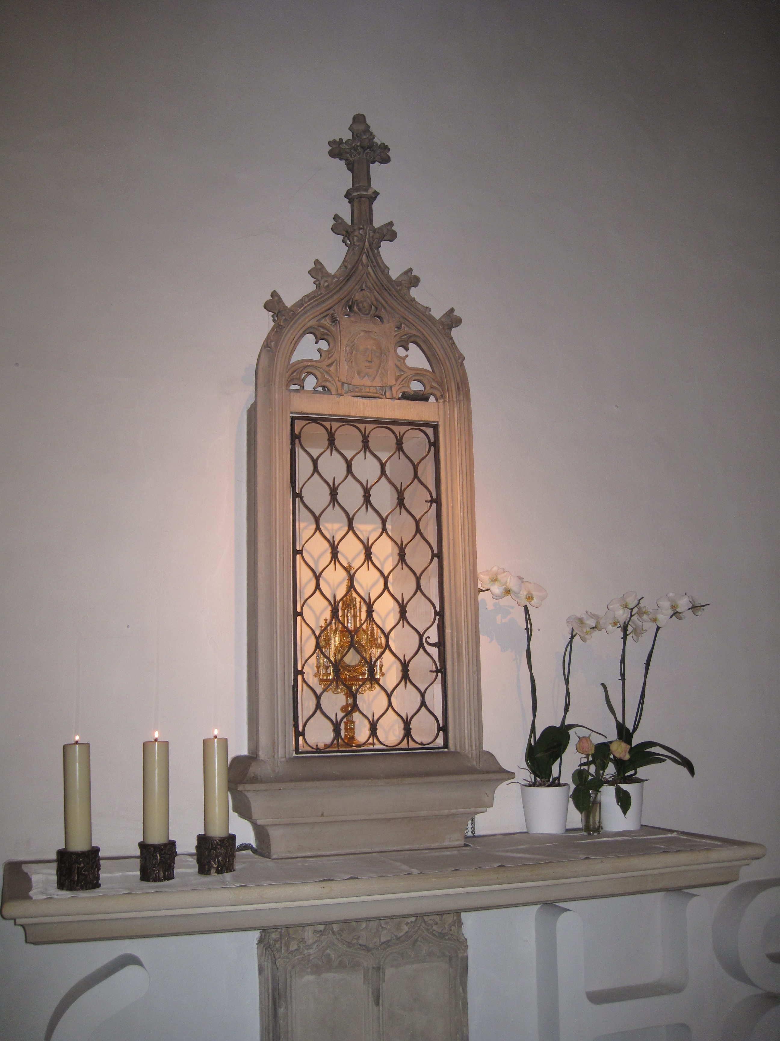 Sakramentshäuschen (Ostensorium) aus der Zeit um 1460 in der Sakramentskapelle der Propsteikirche St. Peter und Paul in Bochum.